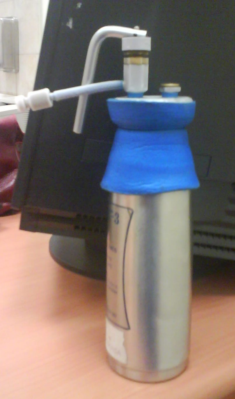 Liquid nitrogen spray tank